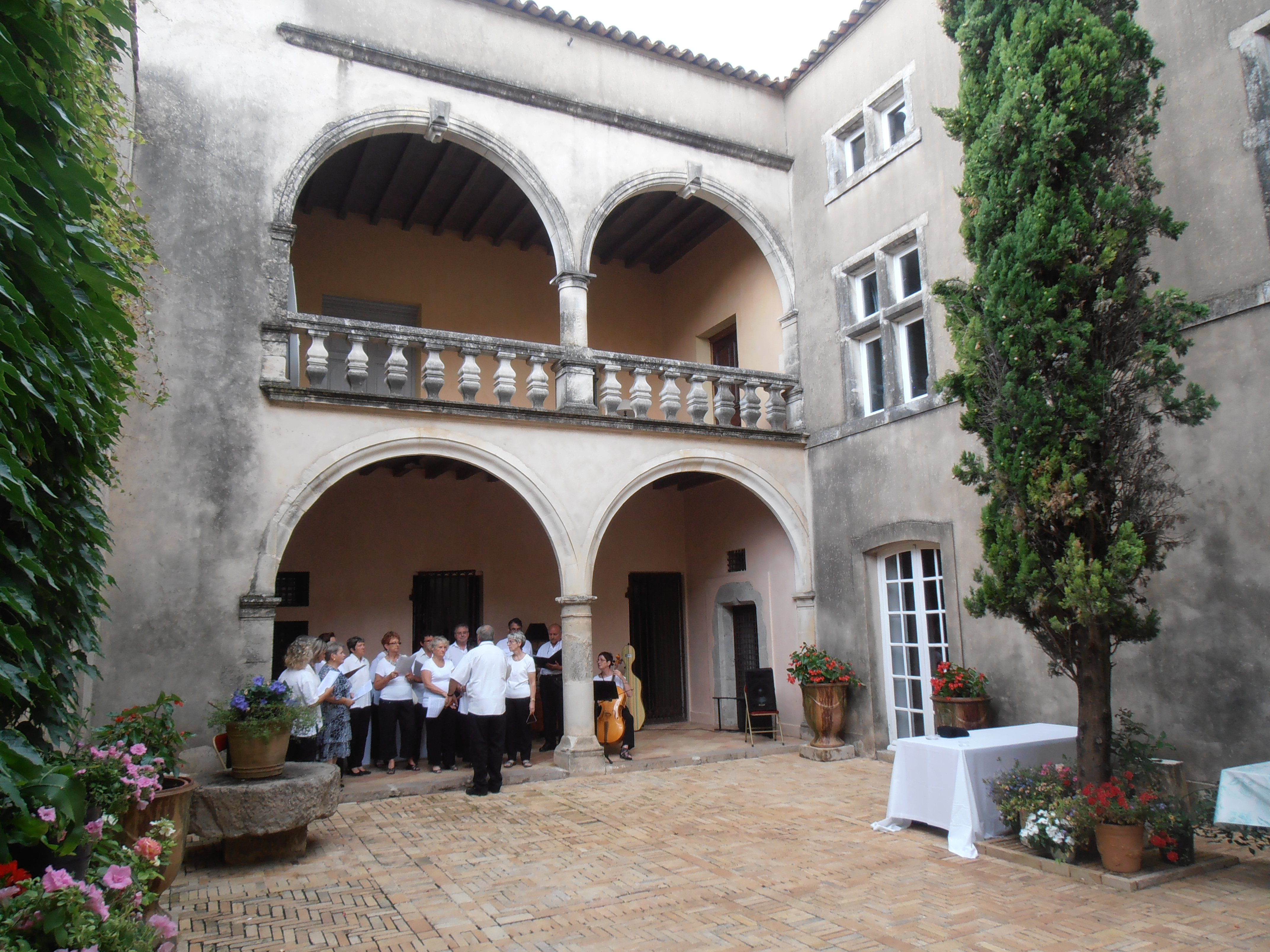 Var, Vins-sur-Caramy. La chorale de Vins a tenu à s’associer à la manifestation organisée le 4 juillet 2014 pour le 30ème anniversaire de l’Association de sauvegarde et d’Animation Culturelle du Château de Vins. A cette occasion Bernard Lucquiaud a présenté son livre au public aux côtés de Jean Clotaire Bonnet « Une vie, une passion … et les pierres revivent à Vins (Mémoires) ».